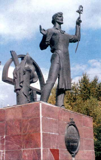 Monument I.N.Bushuev